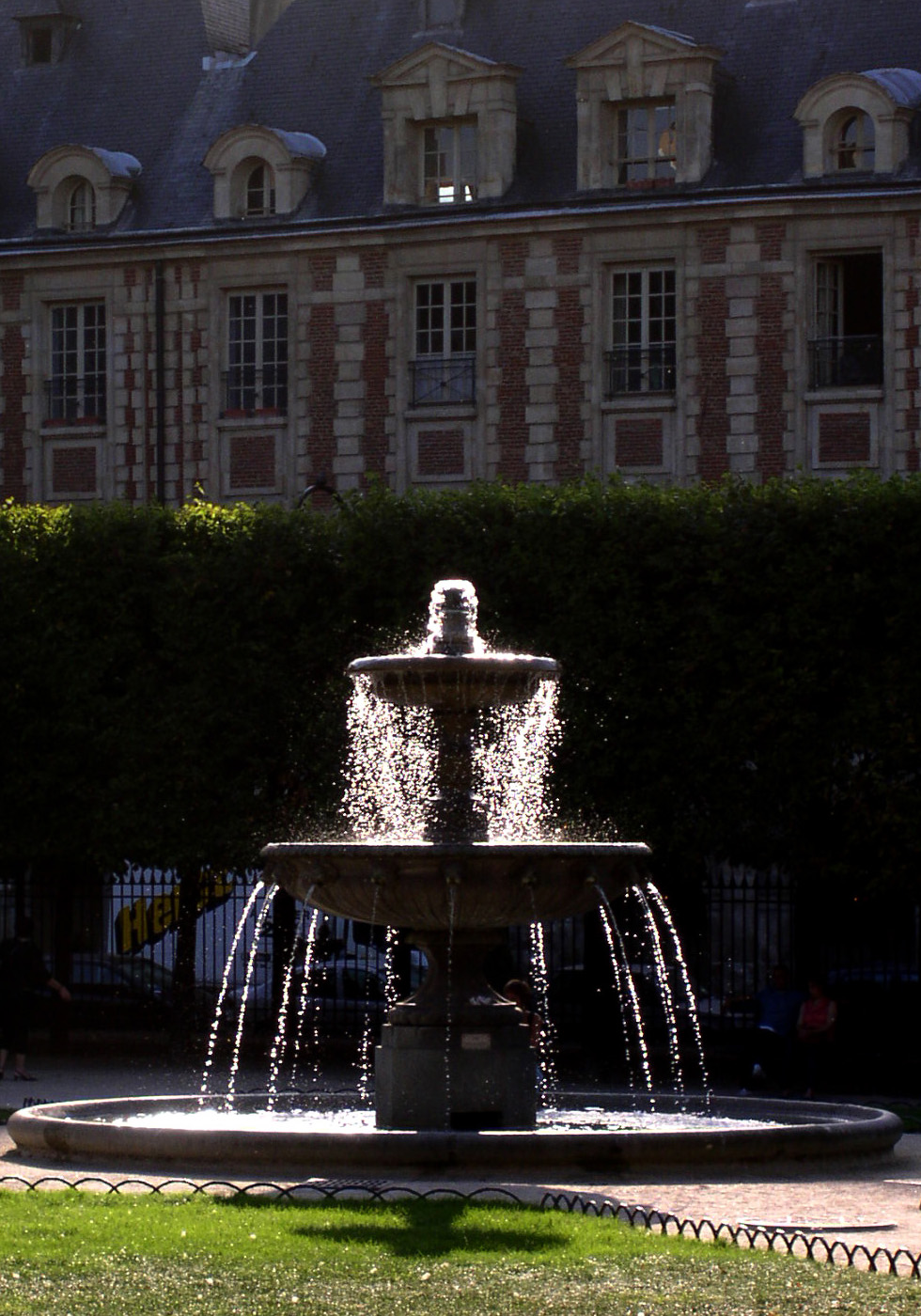 Fountain at Place des Vosges, Paris